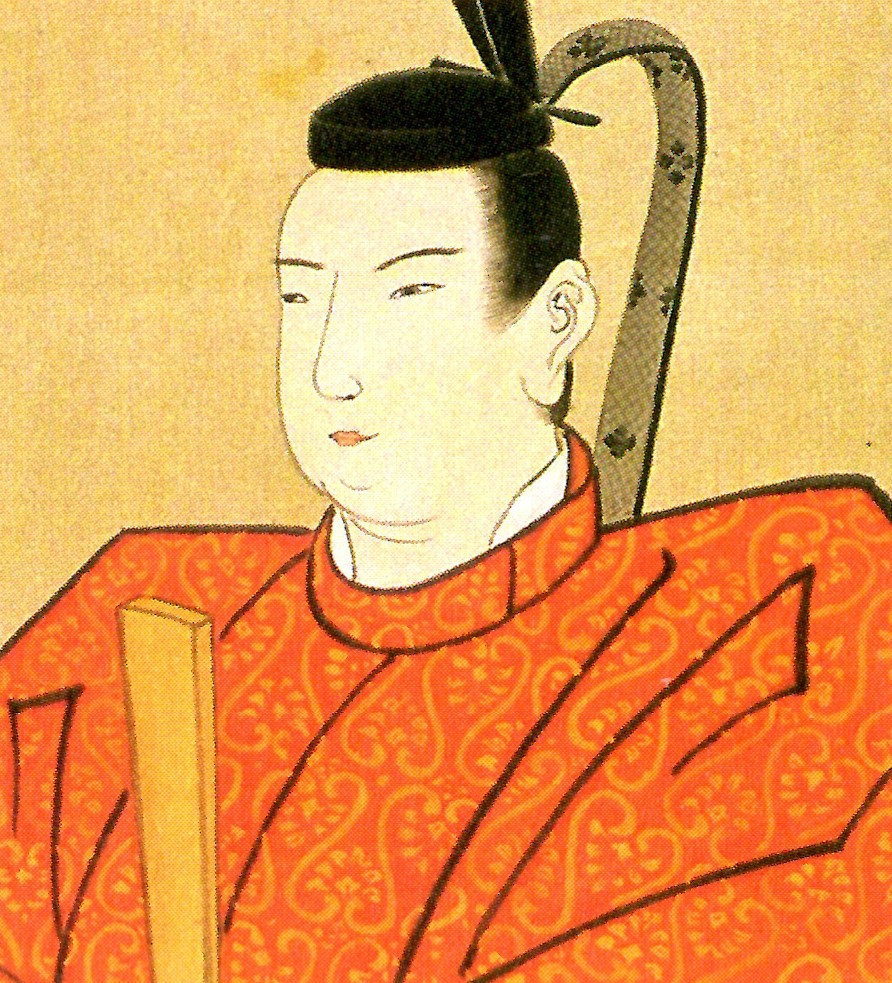 遠山友将の肖像。